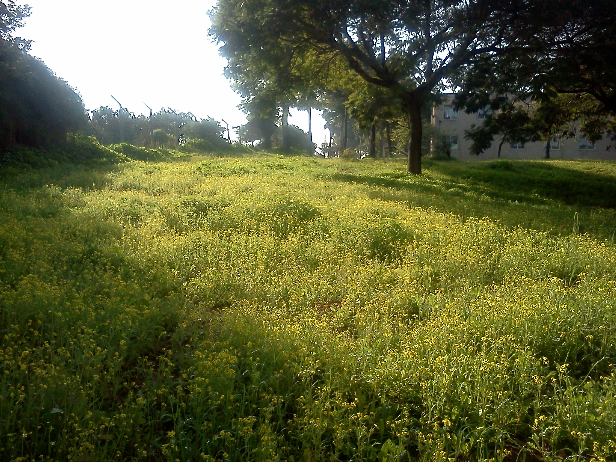 פריחת סביונים בכפר הנוער יוענה ז'בוטינסקי